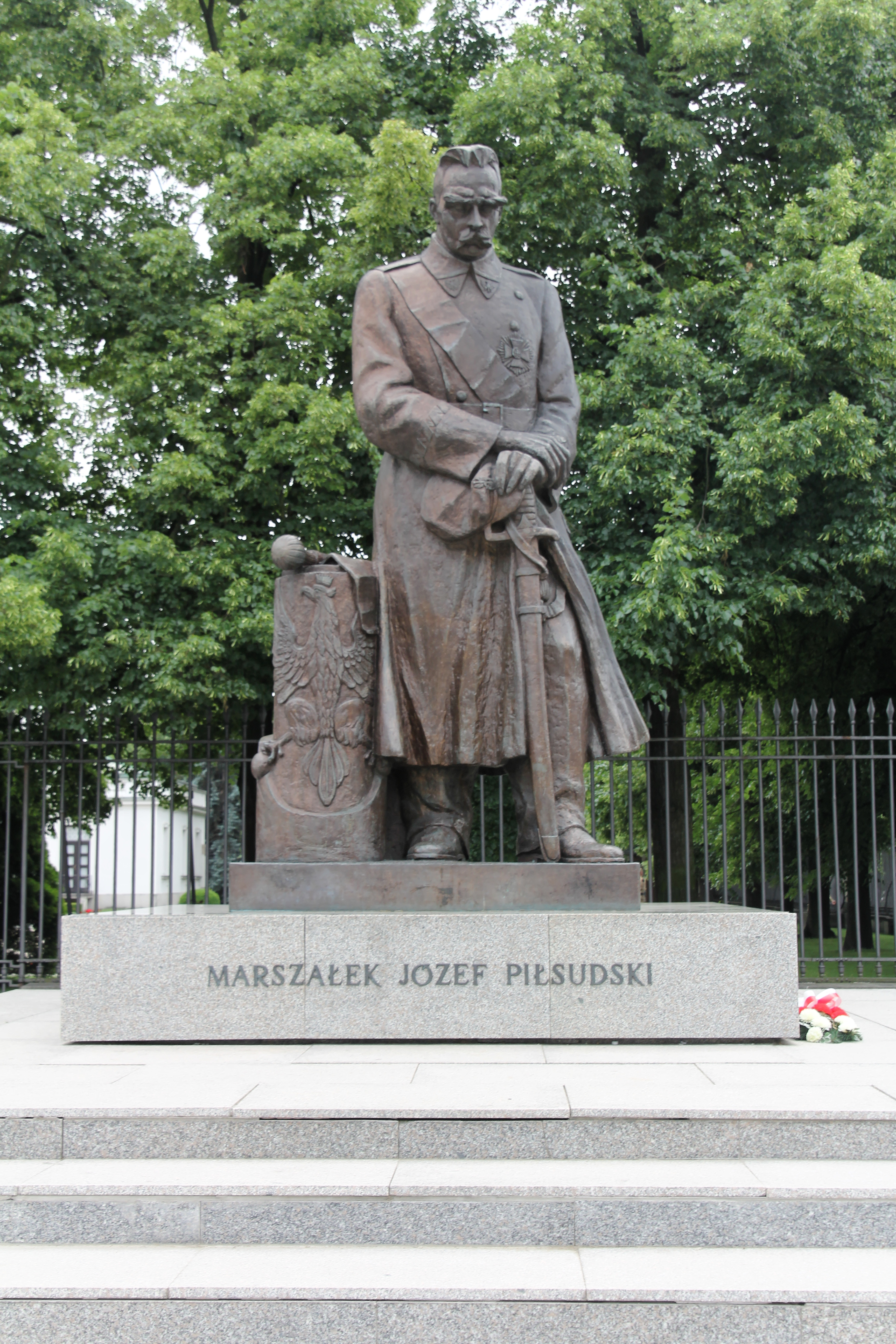 Denkmal des Marschalls Jozef Pilduski vor dem Belwedere in Warschau